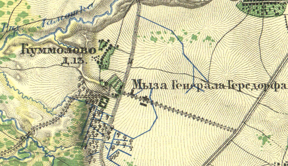 Куммолово на карте 1860 года.